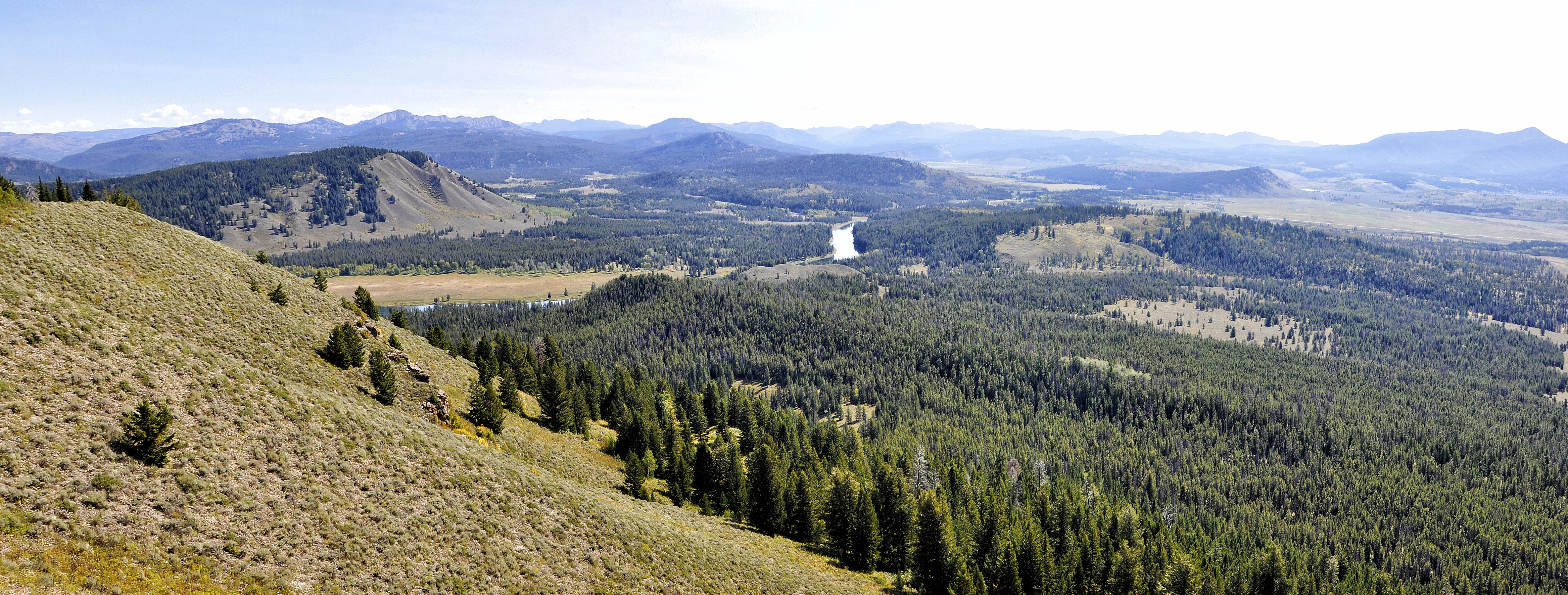 Zicht vanaf Signal Mountain (Wyoming) op de vallei aan de oostelijke zijde en Snake River